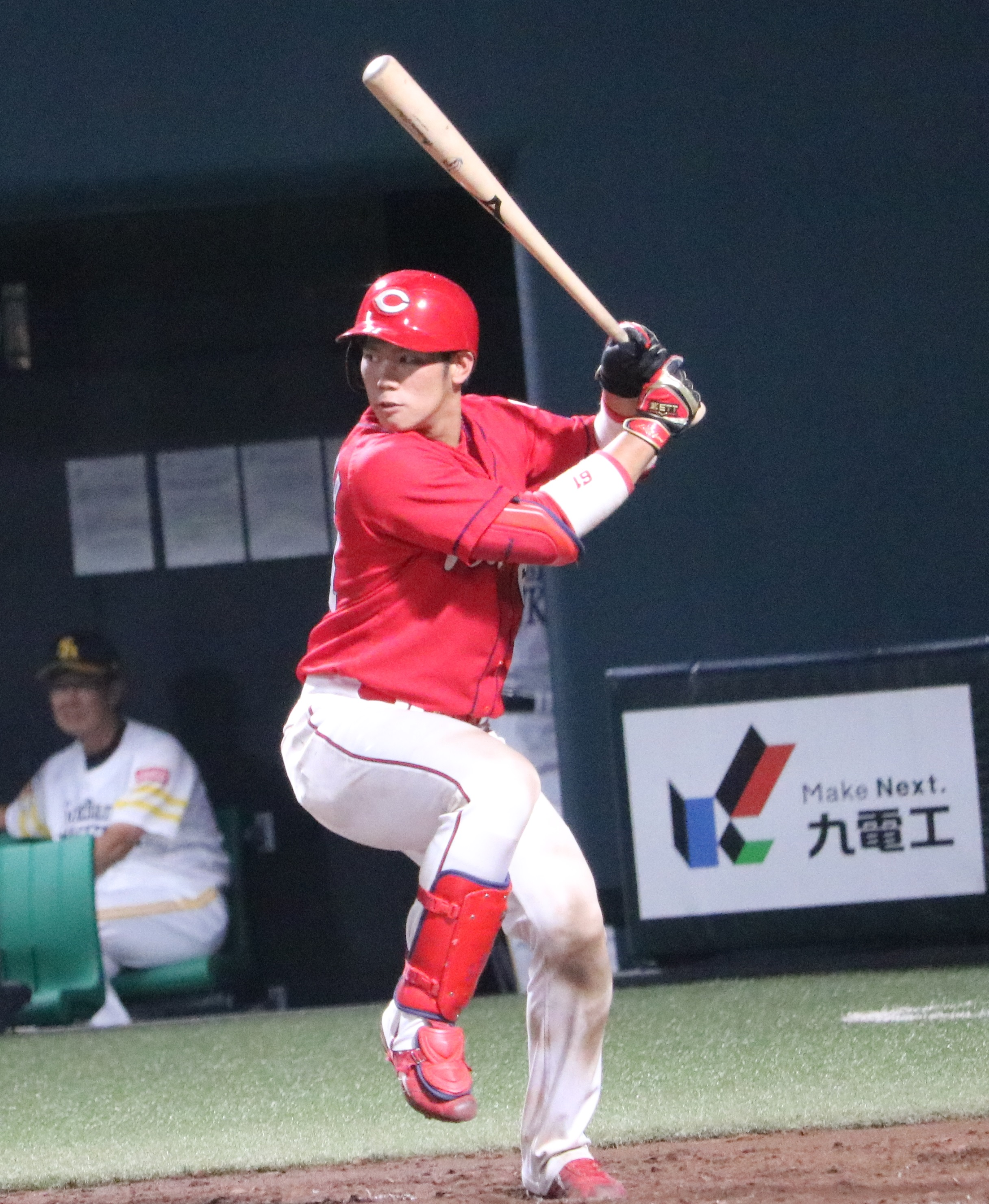 打席での坂倉(2017/7/28 ウエスタンリーグにて)